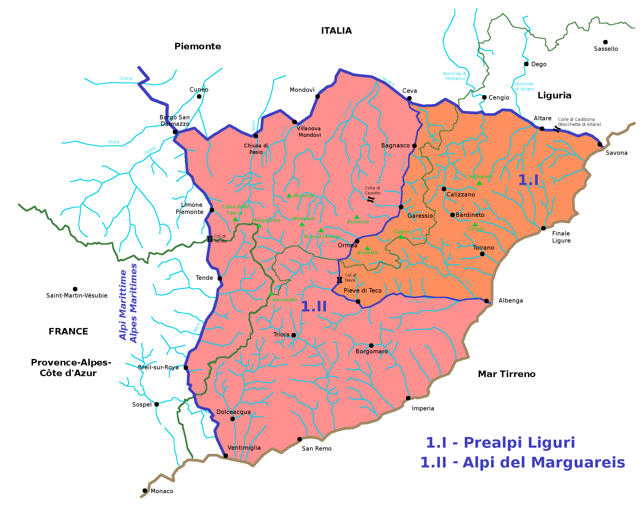 Carta schematica della sezione Alpi Liguri delle Alpi (secondo la SOIUSA). In evidenza la rete idrografica, i confini politici ed ammnistrativi, i principali centri abitati, le vette principali.